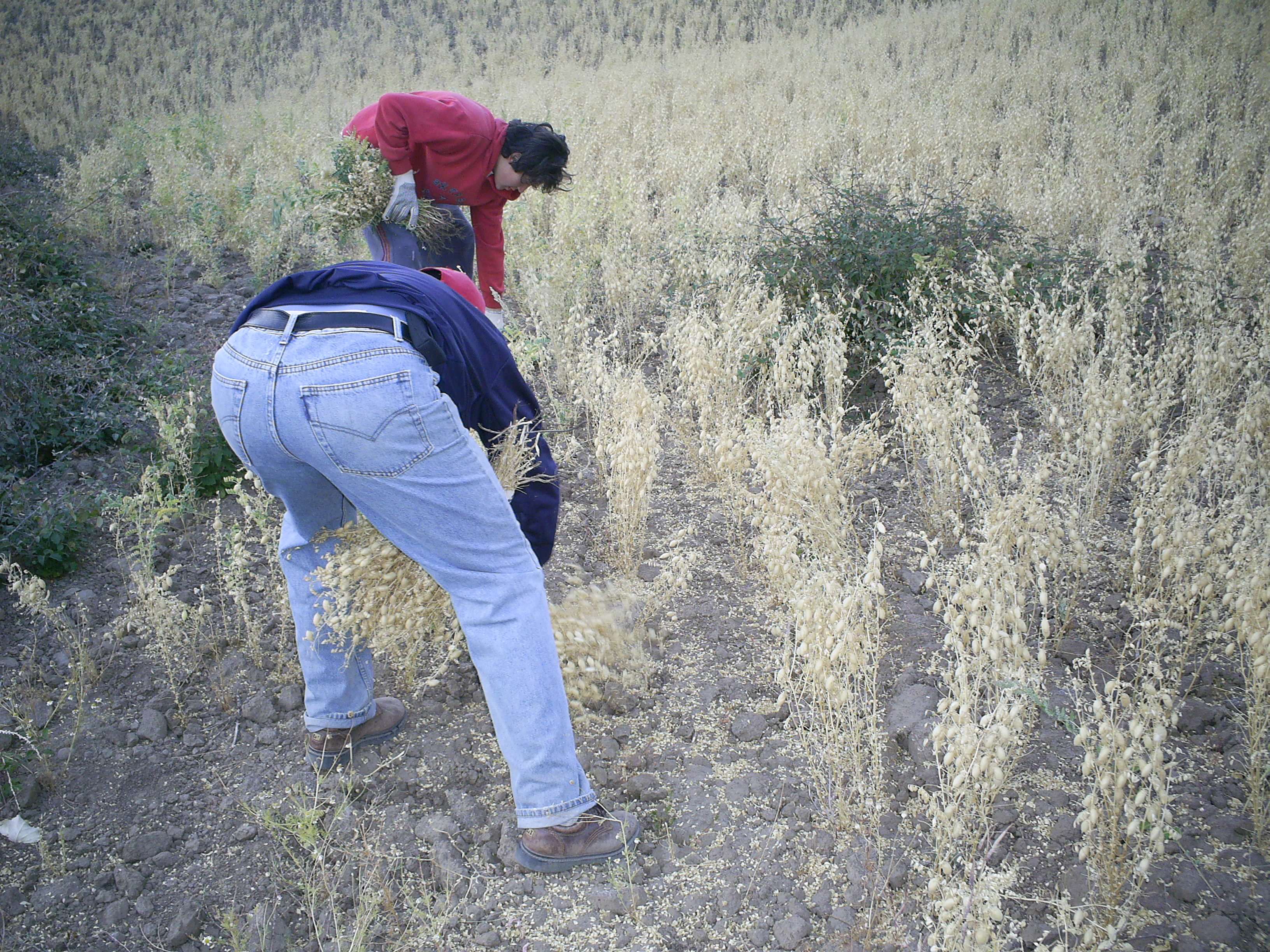 Garbanzos